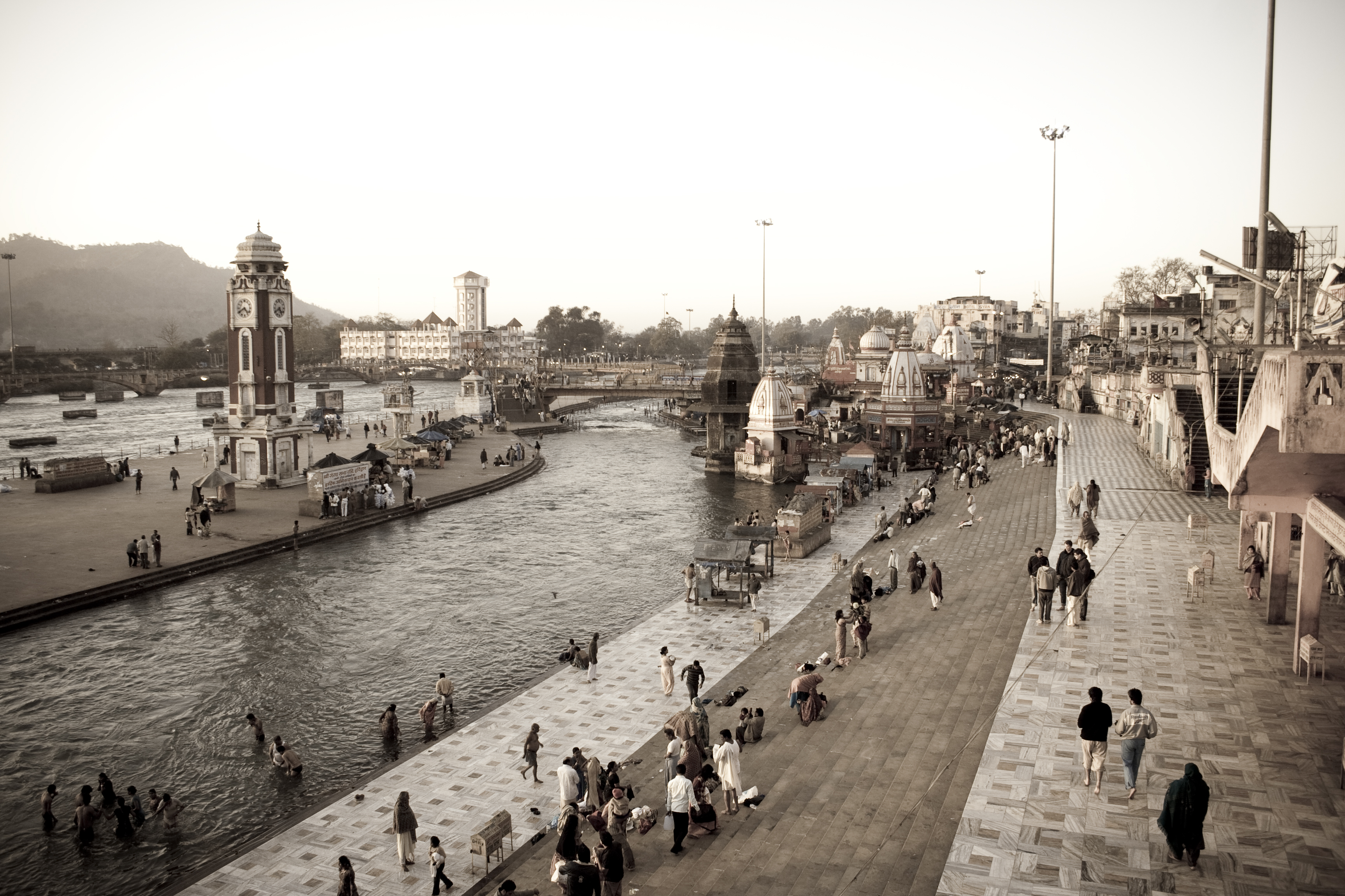 Sunrise view of Har-ki-pauri, Haridwar